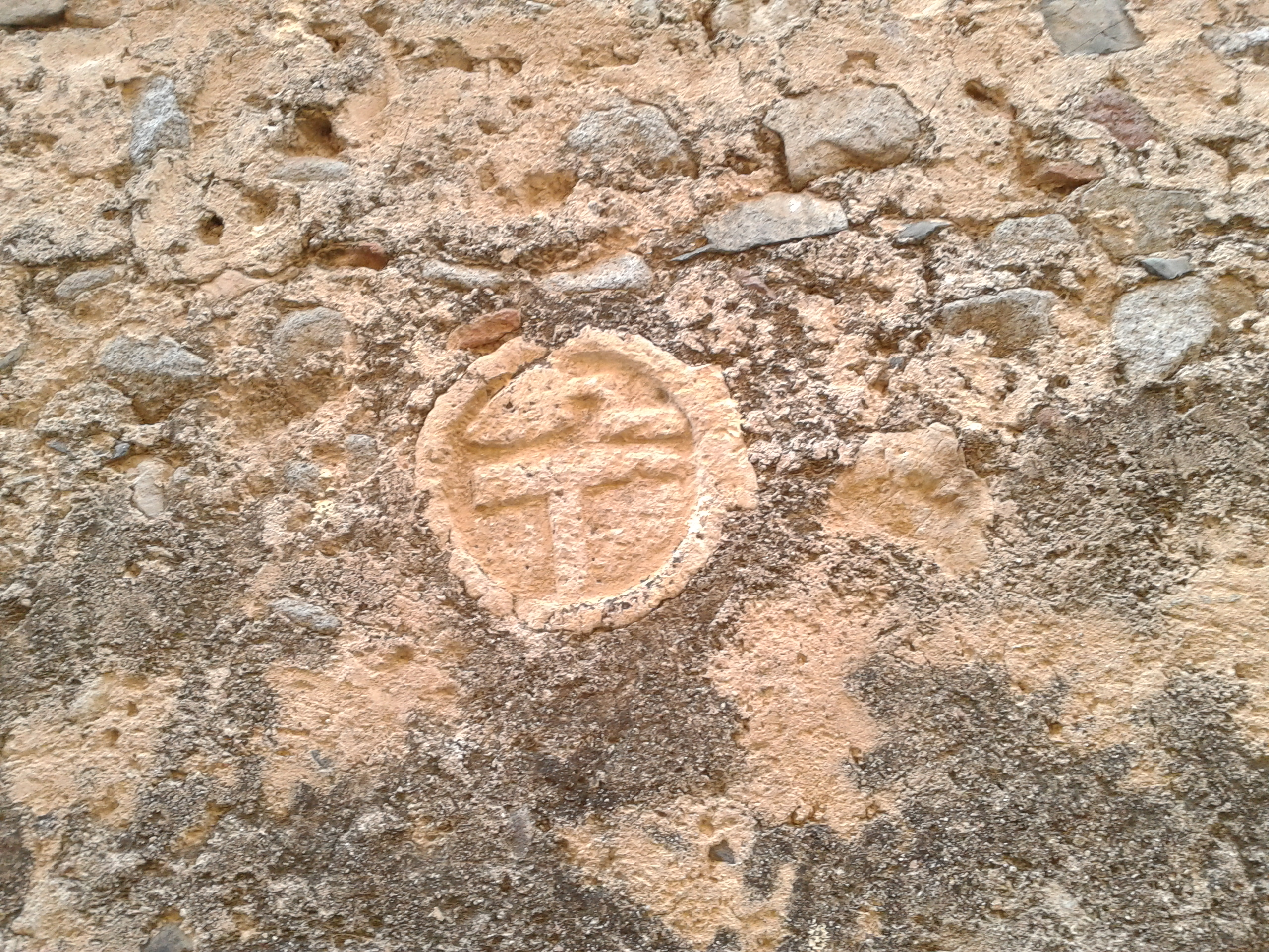 Estela funerària discoïdal que es reaprofità com a element decoratiu de la paret de l'església parroquial de Sant Martí (l'Aleixar)